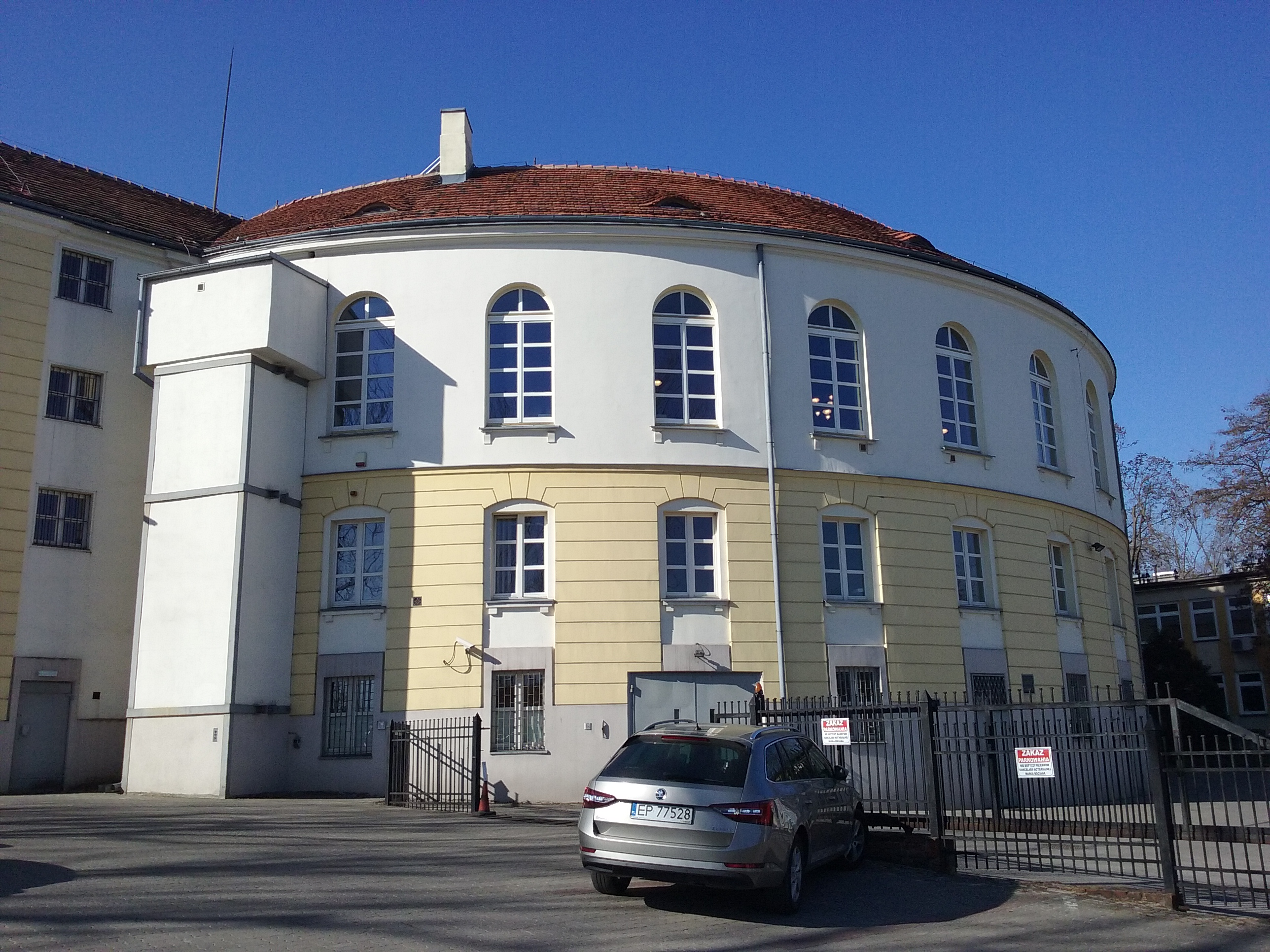 Kompleks bankowy przy ulicy Mościckego w Tomaszowie